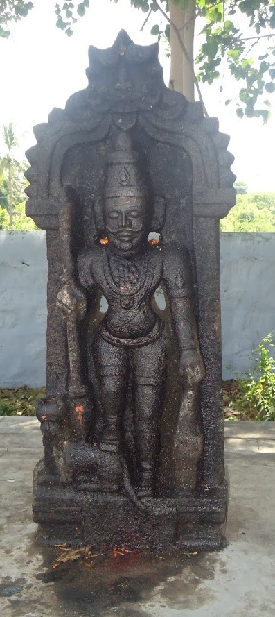 மாசி பெரியசாமி சிலை வைரசெட்டிபாளையம் Other information மாசி பெரியசாமி சிலை வைரசெட்டிபாளையம்